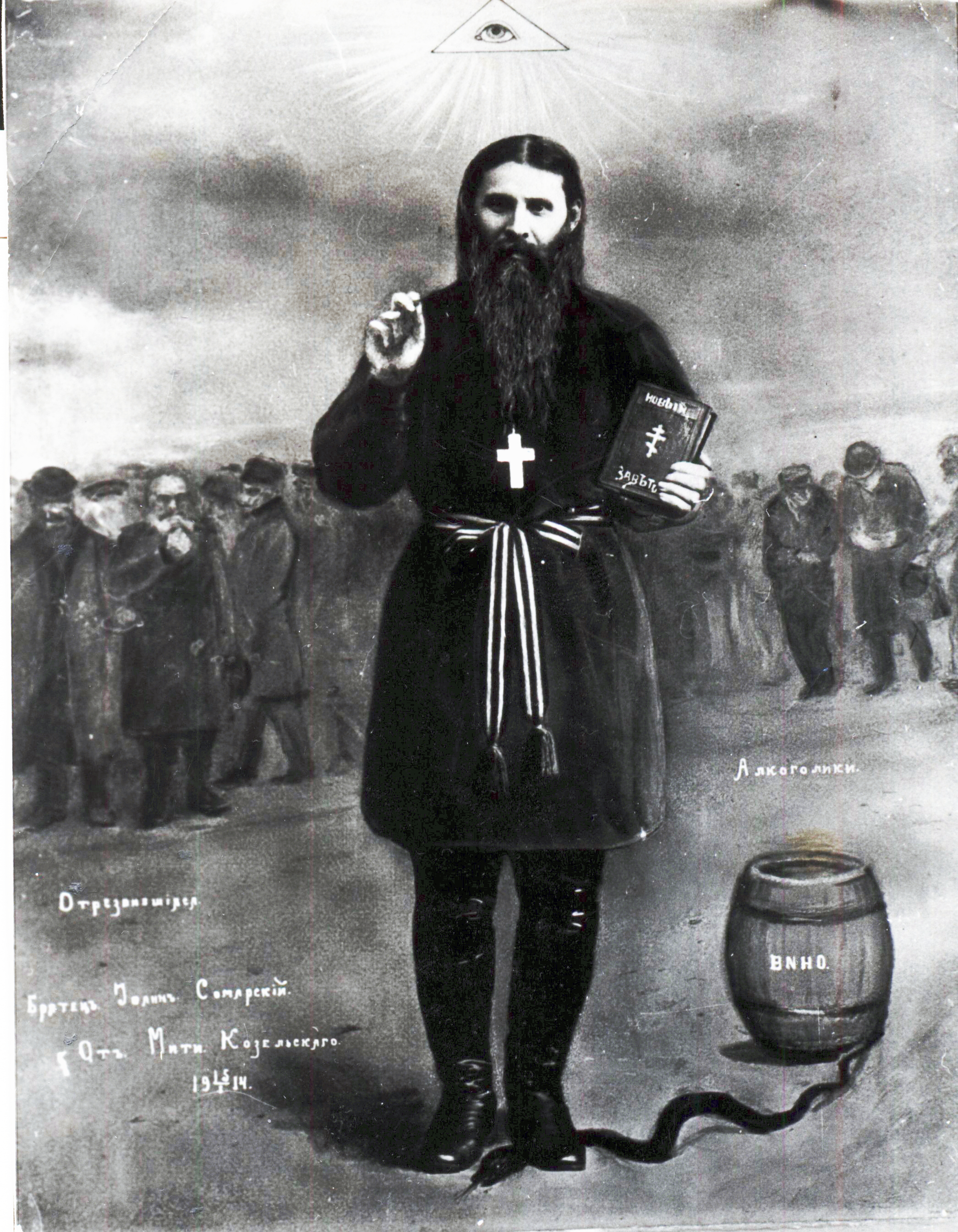 Фото Иоанна Чурикова